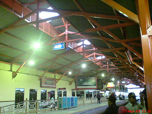 Salah satu sudut peron Stasiun Pasarturi